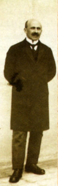 Bernolák Nándor népjóléti miniszter, jogász, egyetemi tanár